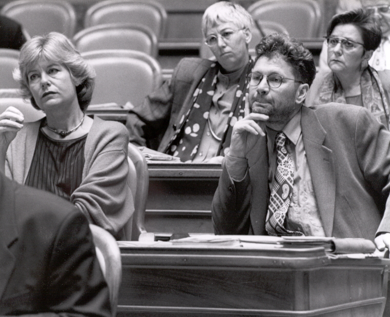 Vier Mitglieder der Grünen Fraktion im Schweizer Nationalrat: Verena Diener, Rosmarie Bär, Hanspeter Thür und Cécile Bühlmann (von links nach rechts)